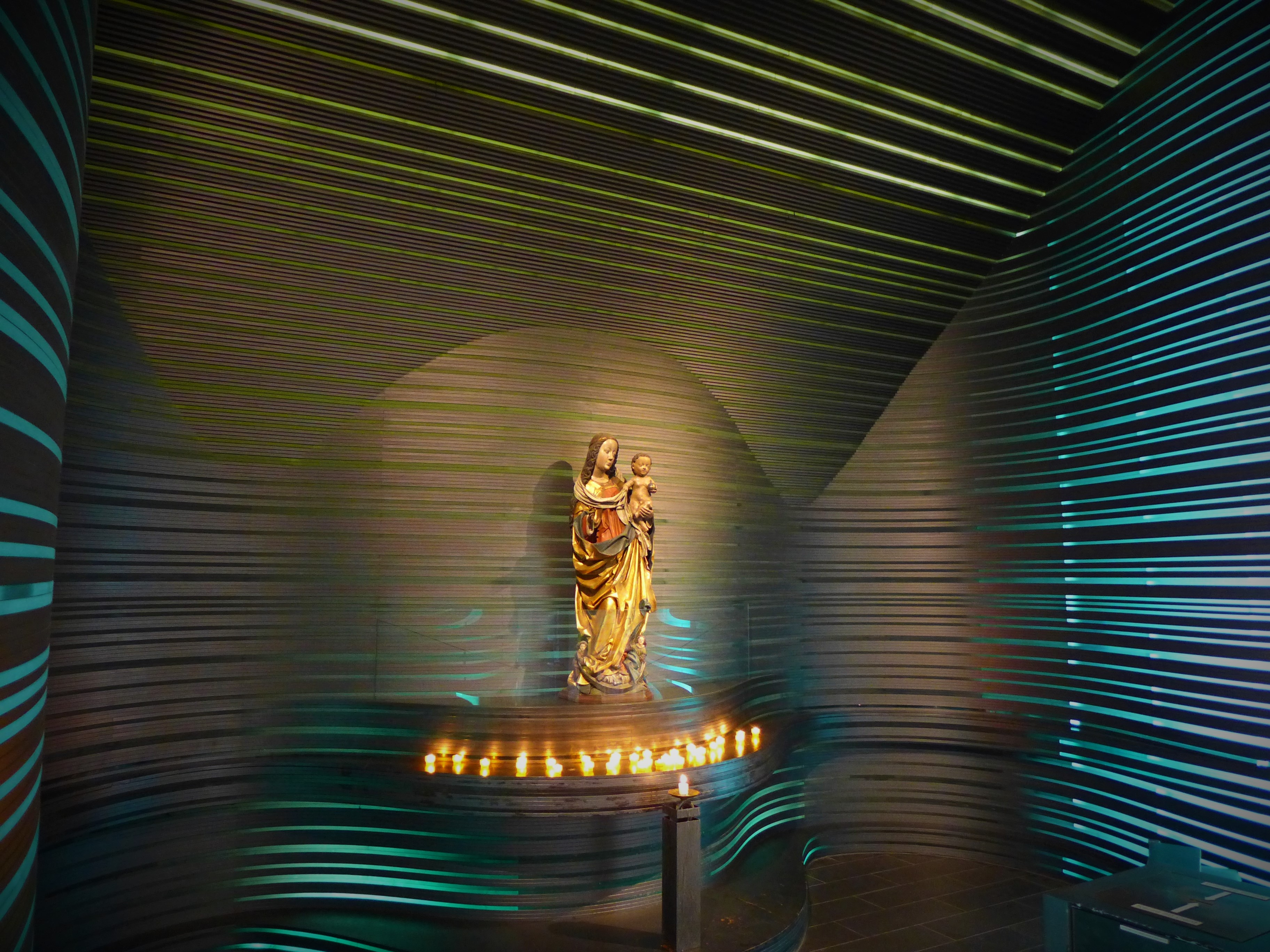 Marienkapelle der Nürnberger Klarakirche aus geschichteten Glasplatten